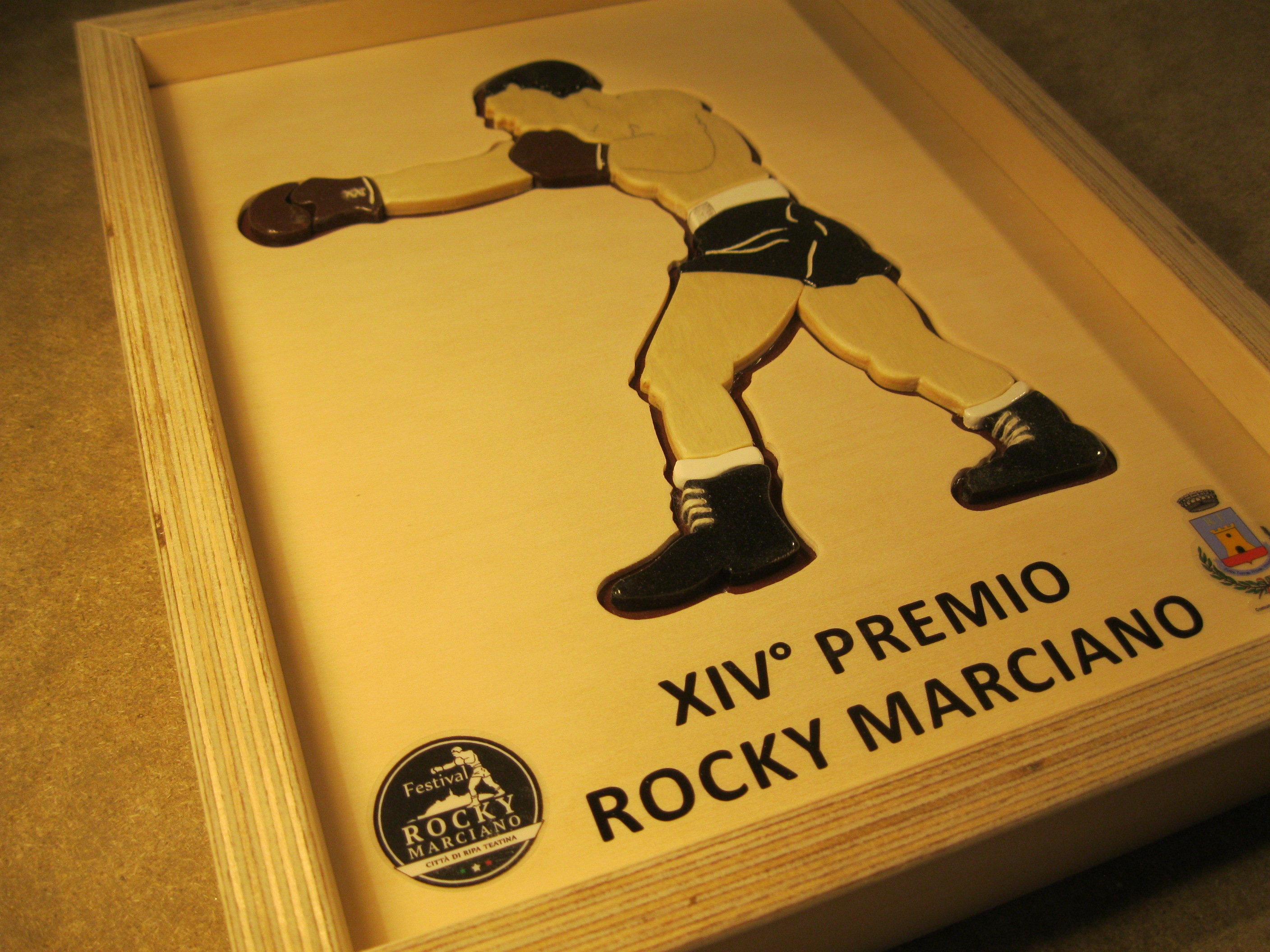 Nel quadro in legno c'è un rilievo che raffigura una stilizzazione di Rocky Marciano (nella stessa posizione della statua presente a Ripa Teatina) con il logo del Premio in basso a sinistra, quello del comune in basso a destra e al centro la scritta "XIV° PREMIO ROCKY MARCIANO".Opera della XIV° l'edizione Realizzata nel giugno 2018 Opera lignea su base in pioppo e betulla. Tecnica manuale mista a traforo, intarsio e mosaico. Decorazione a smalto sintetico. Grafica su legno.